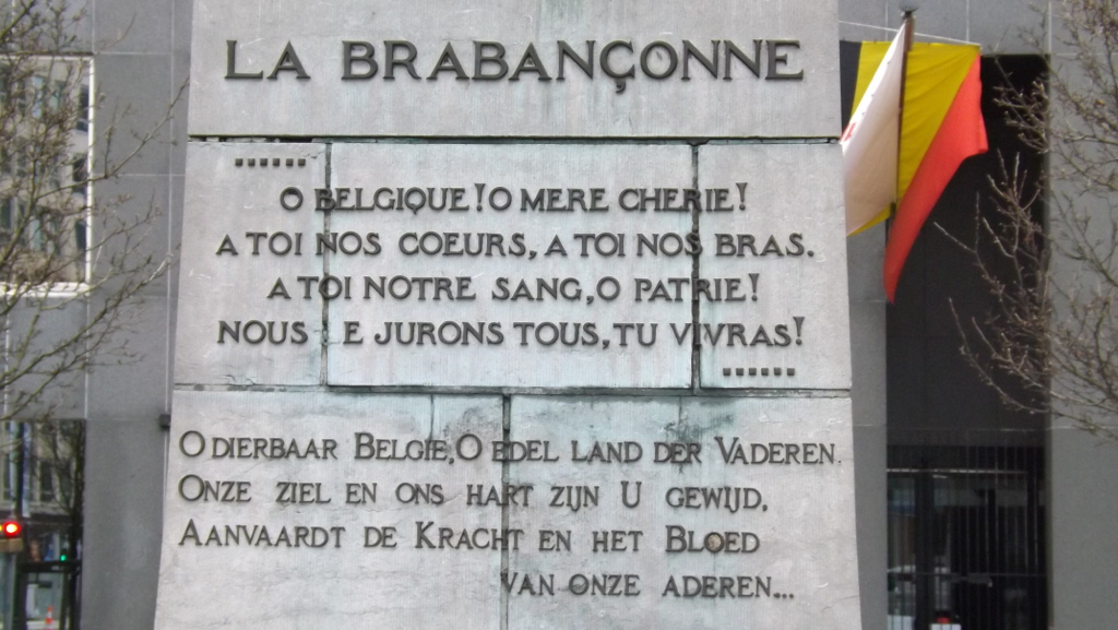 La Brabançonne œuvre du sculpteur Charles Samuel sur la Place Surlet de Chokier à Bruxelles. La troisième version de la Brabançonne est inscrite sur le socle de la statue.